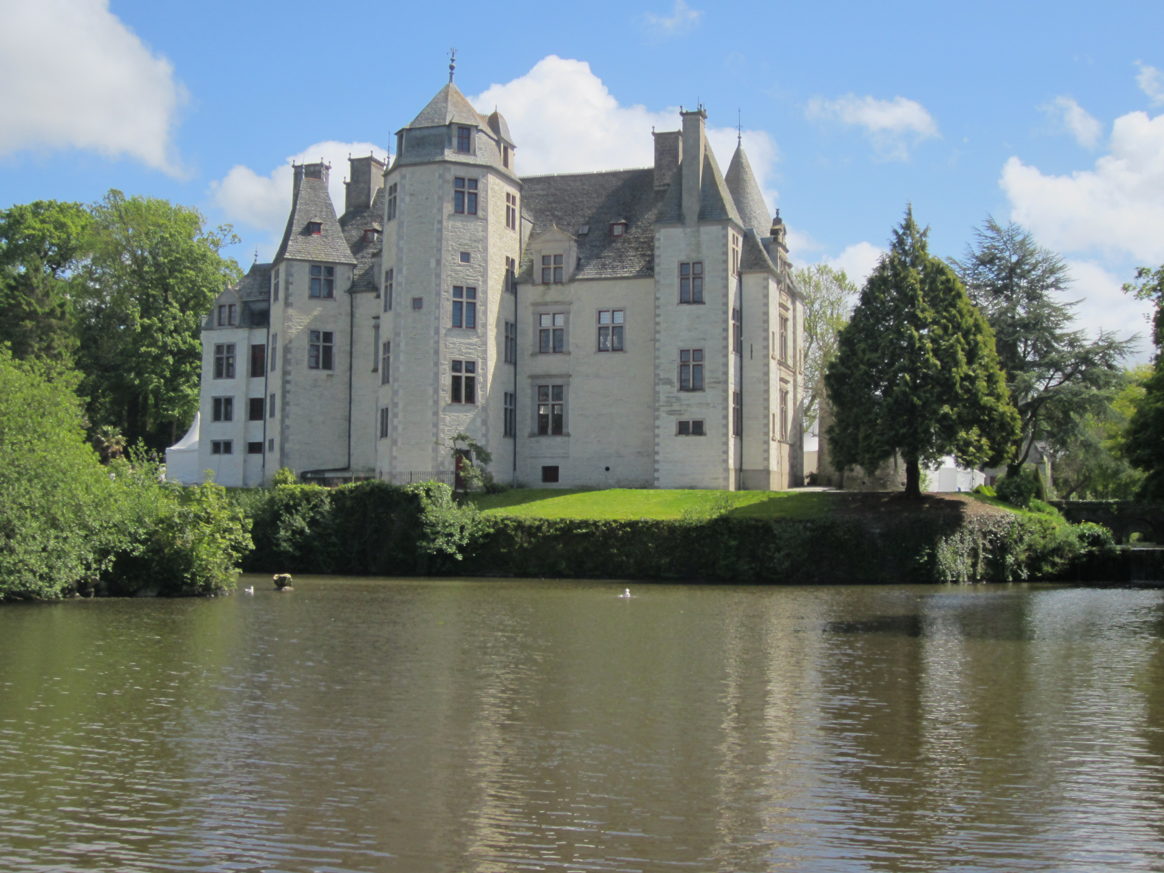 Château des Ravalet, Tourlaville, Manche Pendant l'édition Presqu'île en fleurs de 204 .